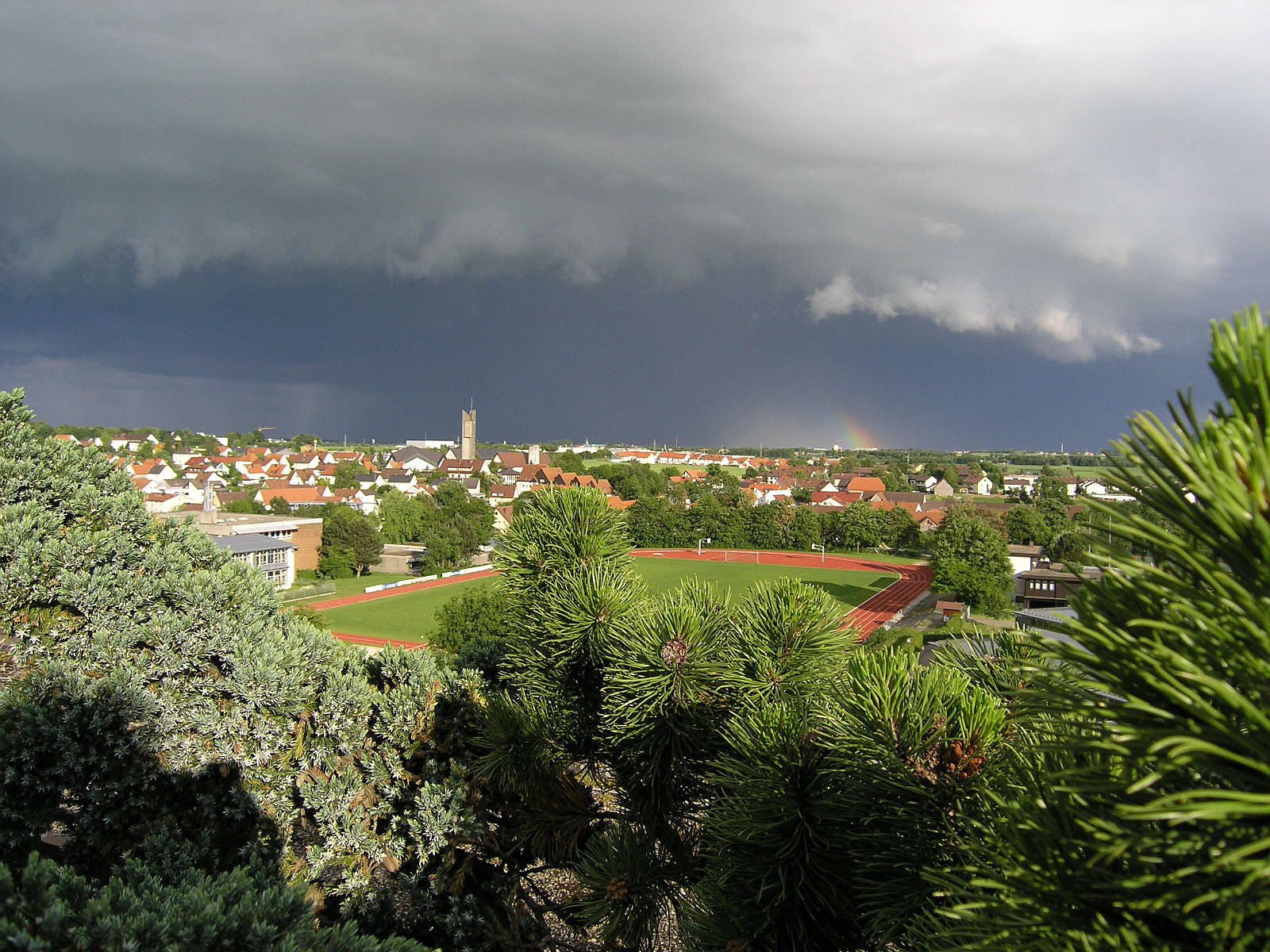 Dornstadt im Sommer fotografiert von Effi Schweizer